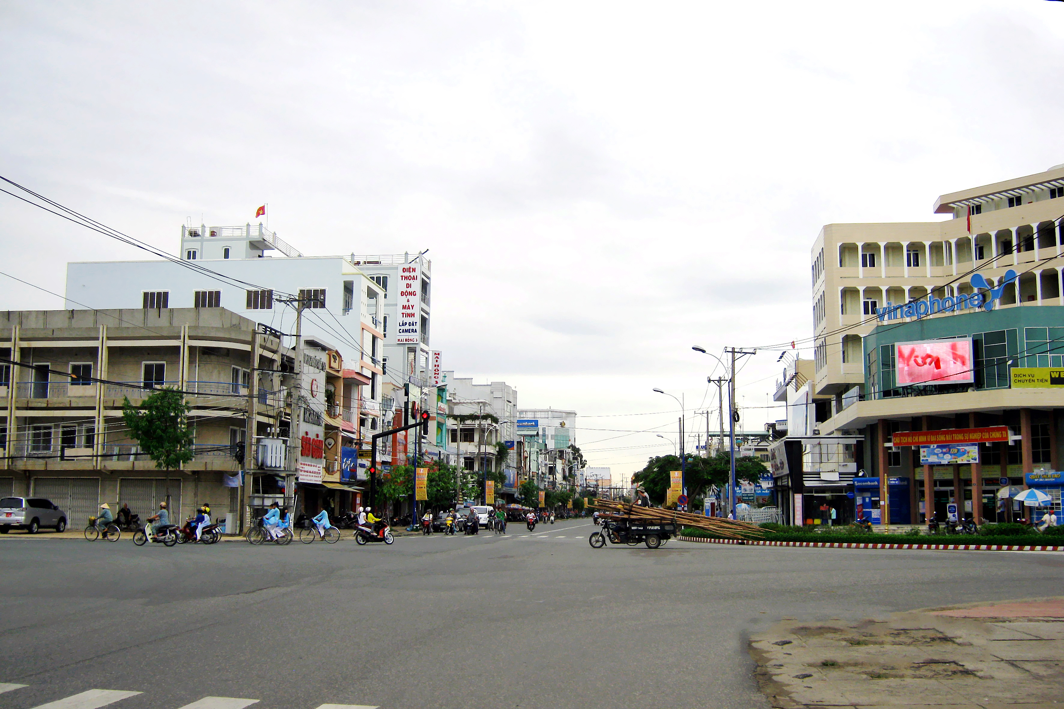 Một cảnh ở trung tâm thành phố Cao Lãnh, thuộc tỉnh Đồng Tháp, Việt Nam.